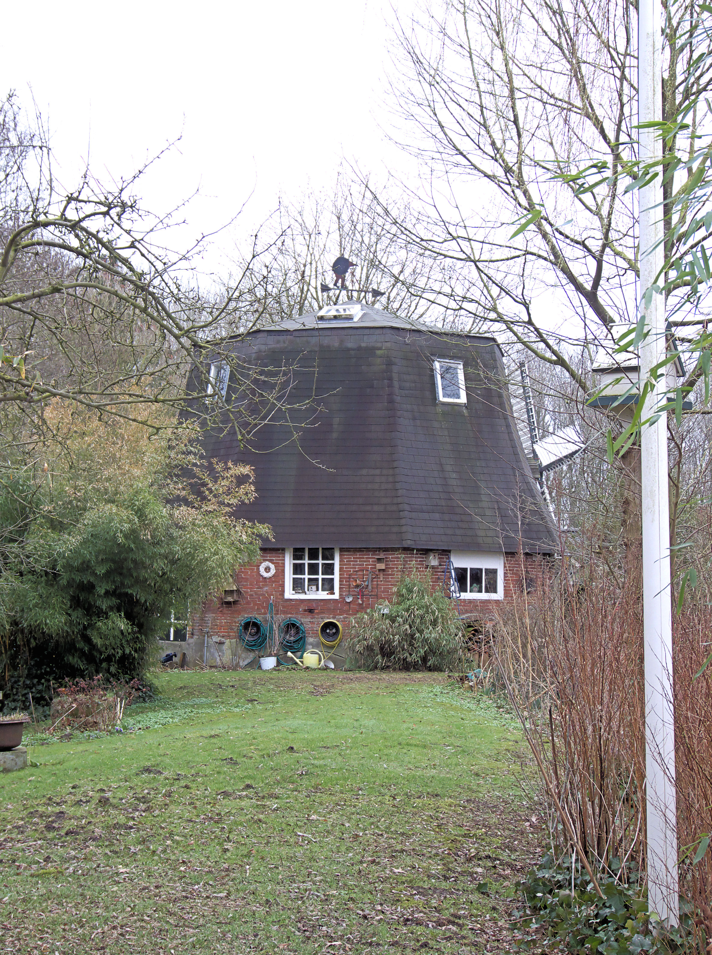 Bewoonde molenrestant van de achtkantige windmolen De Nijverheidspolder in Wedderveer